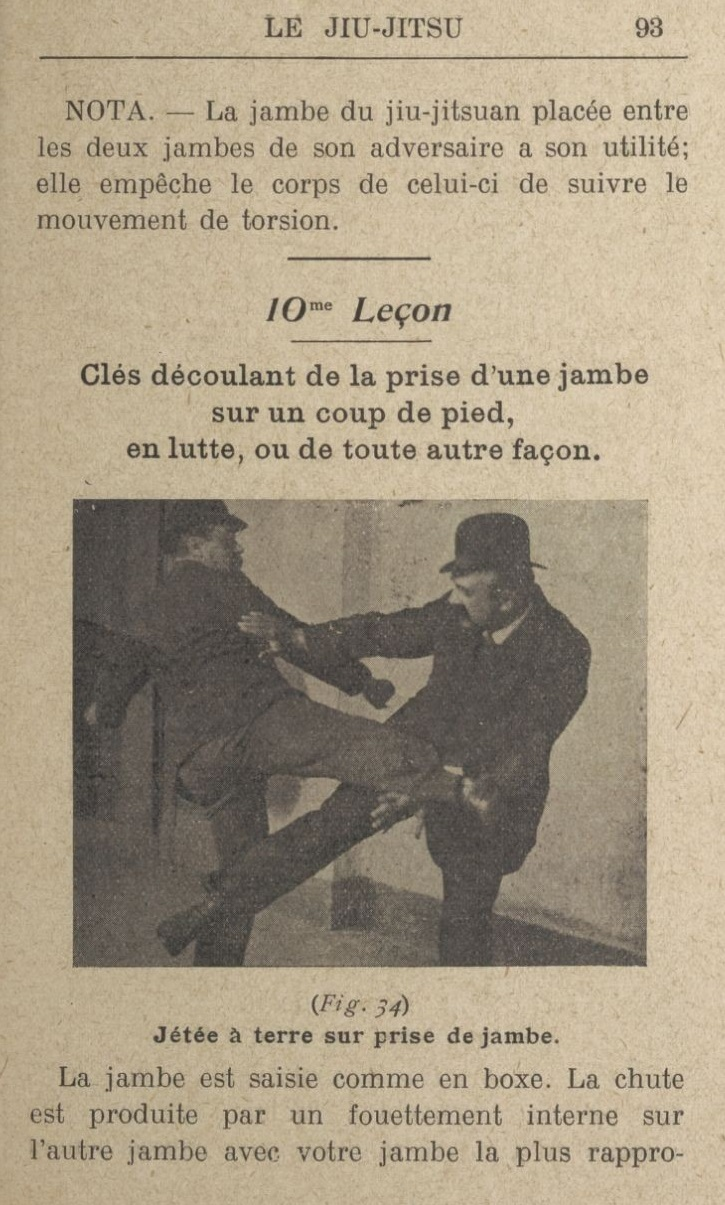 Illustration de l’Enseignement méthodique et pratique du jiu-jitsu, ouvrage d'A. Buvat, Paris, J. Durand & Cie, 1911, p. 98.